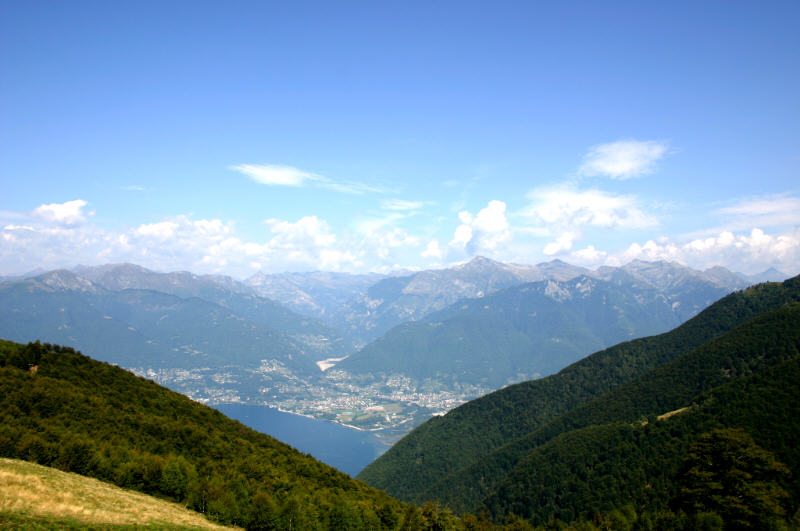 Blick ins Verzascatal, Tessin